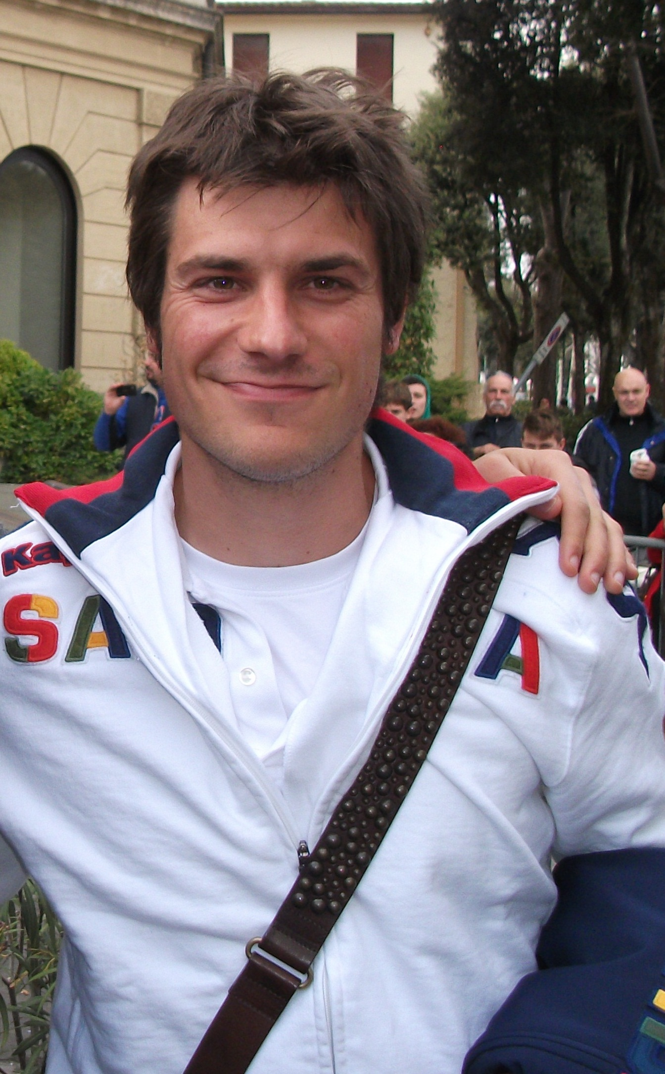 Daniele Dessena prima della partita di Serie A, Siena - Cagliari del 4 marzo 2012.